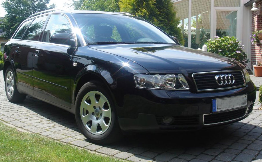 Audi A4 Avant 8E/B6, selbst fotografiert